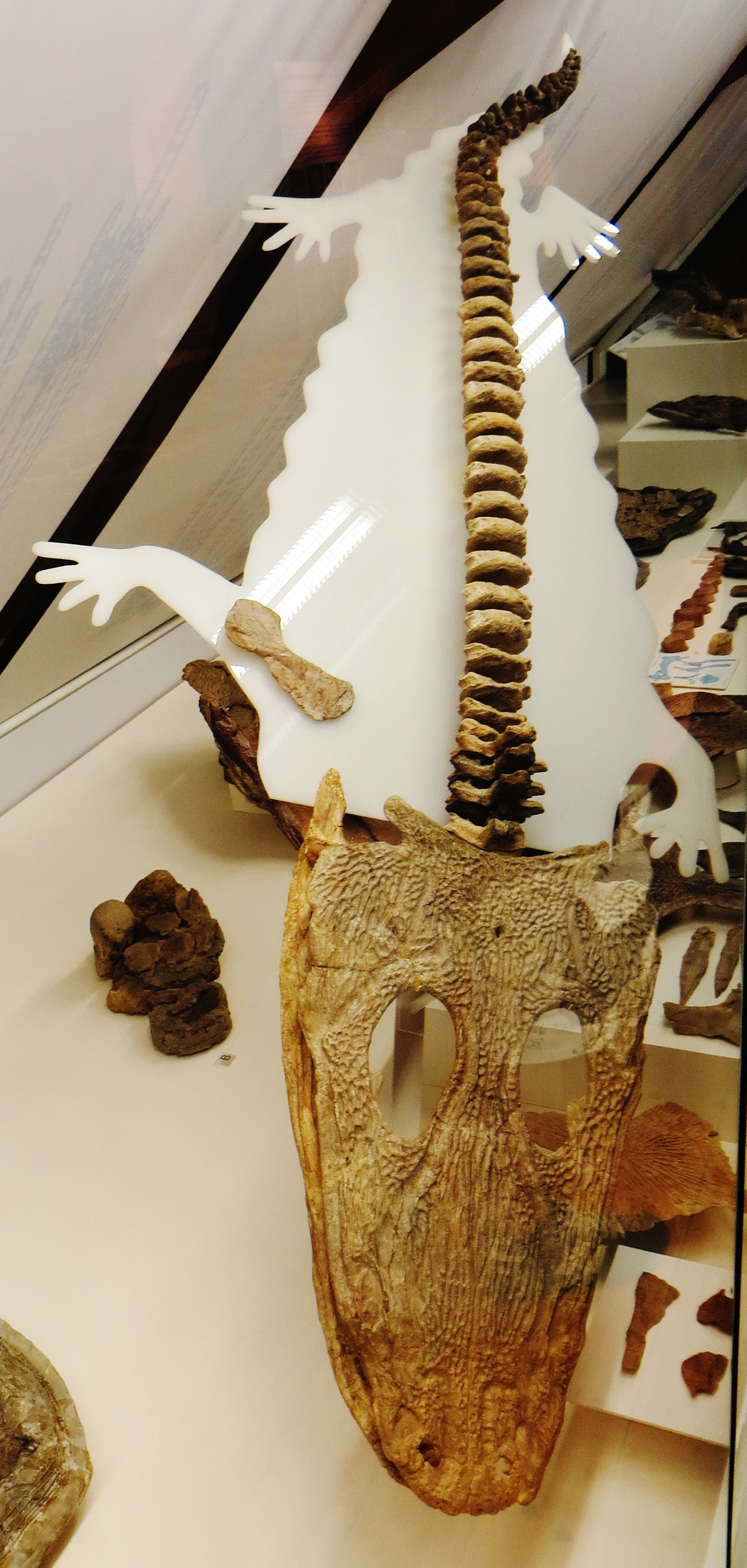 Took the picture at Muschelkalkmuseum Ingelfingen